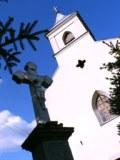 A felsőnyéki római katolikus templom előtti kőkereszt (Tolna megye, Magyarország)